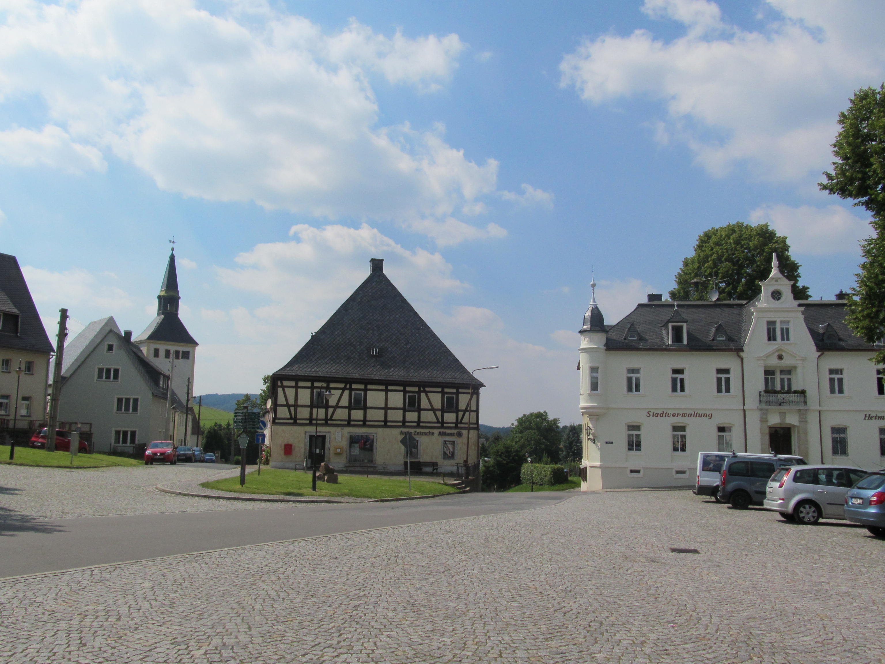 Bärenstein bei Altenberg - Marktplatz